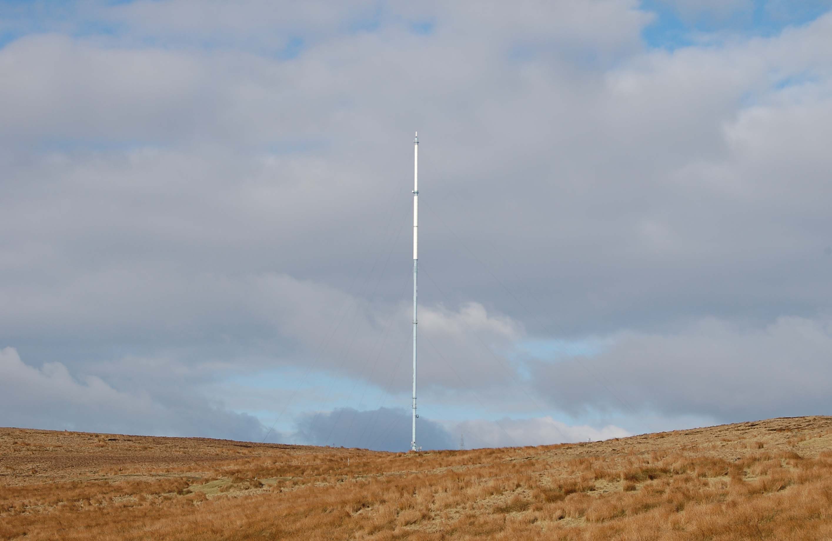 Taken by me, RAW available if needed.